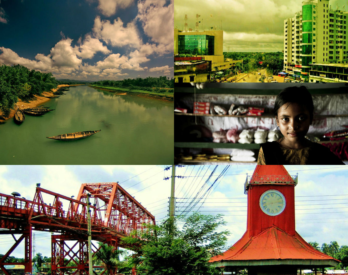 এটি সিলেটকে নিয়ে তৈরি একটি কলেজ। উপর থেকে ডানে সুরমা নদী, উপর থেকে বামে আলী আমাযাদের ঘড়ি, নিচে ডানে গার্ডেন সিটির সম্মুখভাগ, নিচে বামে শাহজালাল (রঃ)-এর মাজার।